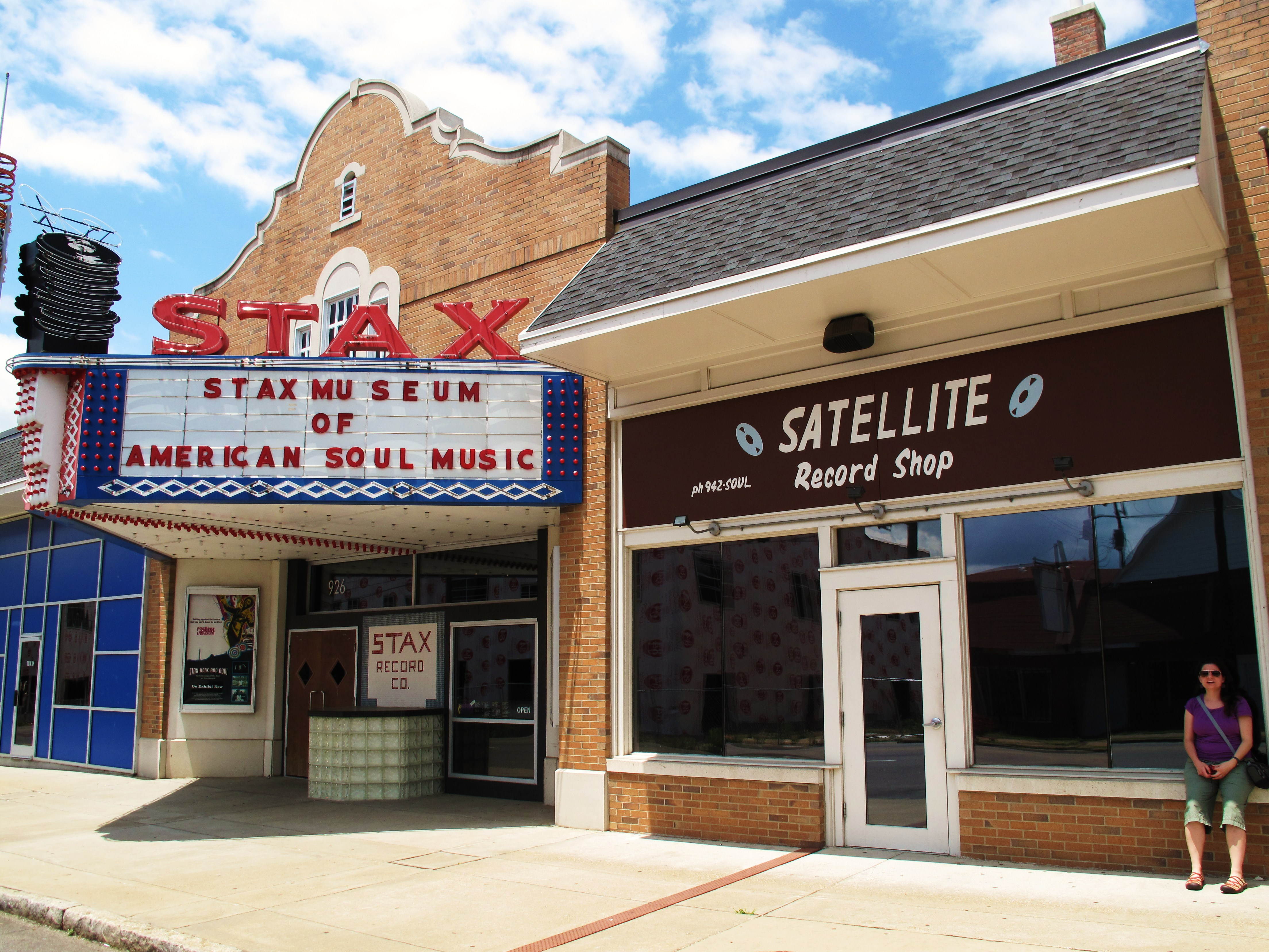 Stax Museum & Satellite Record Shop